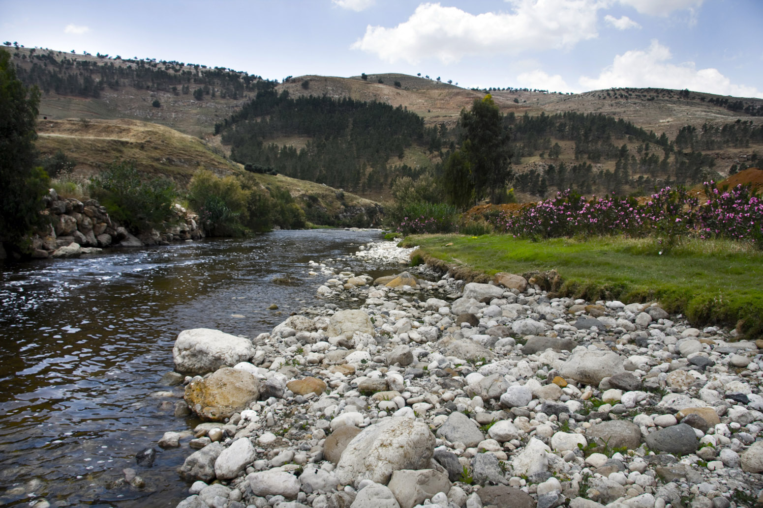 Zarqa River